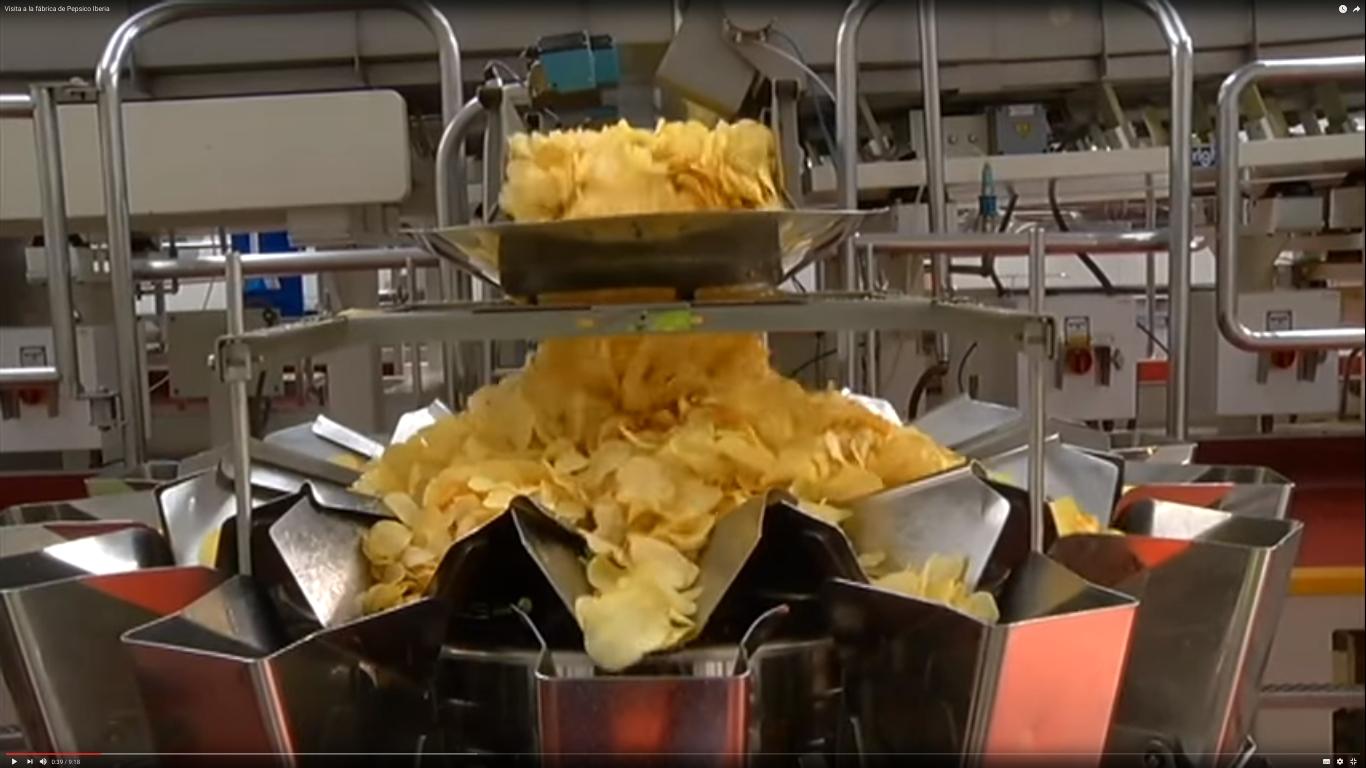 Visita a la fábrica de Pepsico Iberia